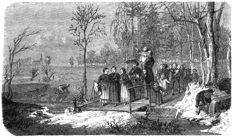 Ostermorgen